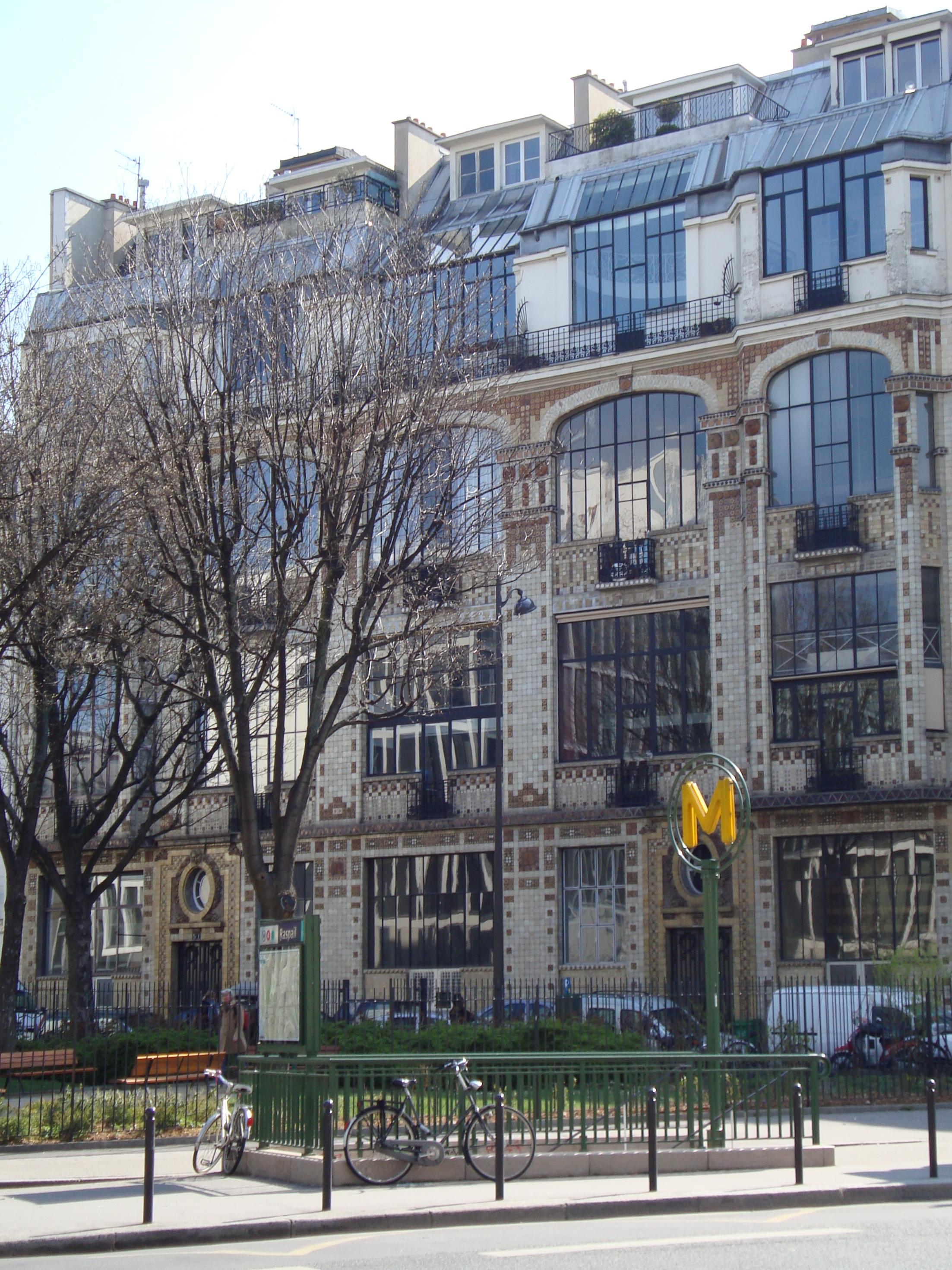 Immeuble du 31 rue Campagne-Première, oeuvre art déco de l'architecte André Arfvidson